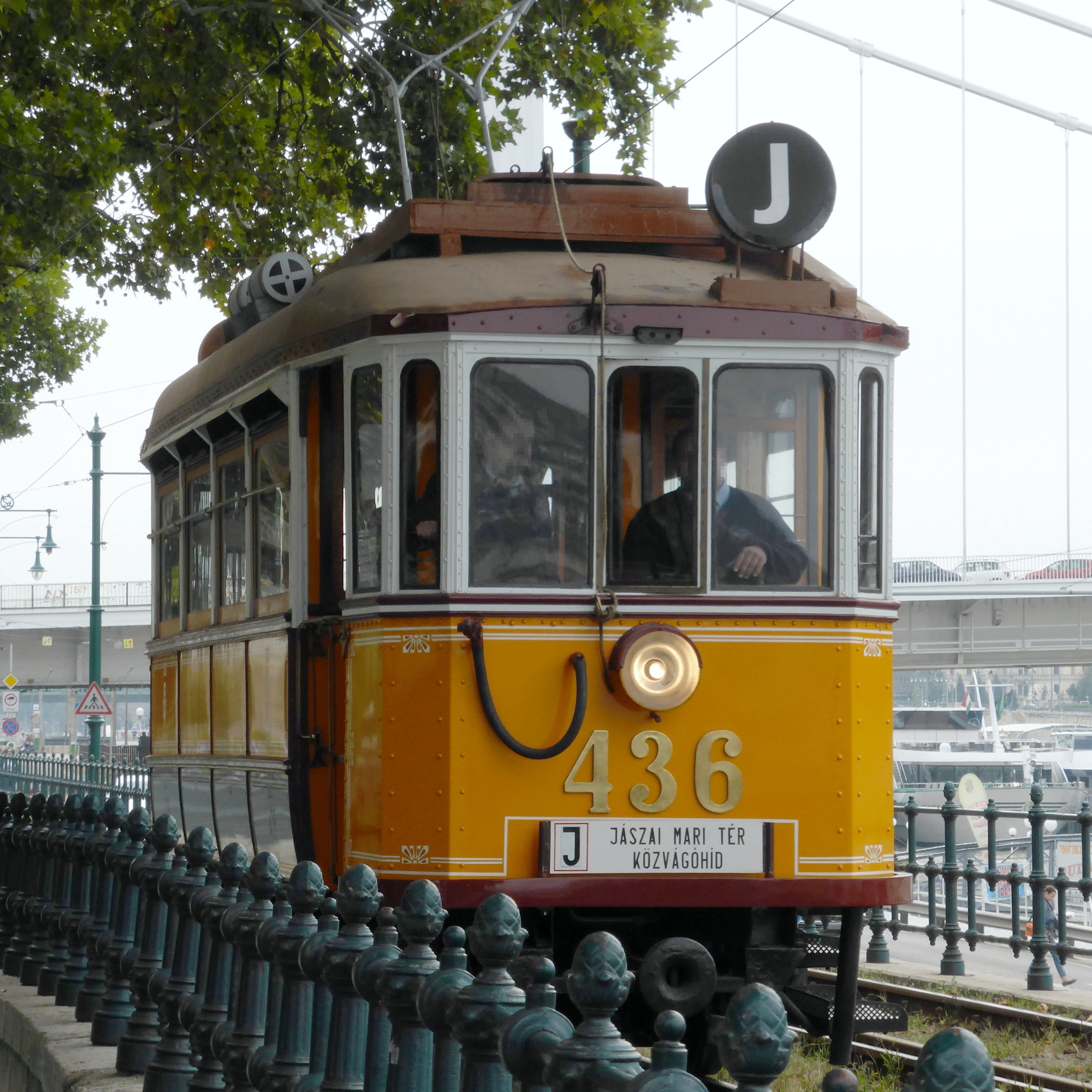 Eine Schlick-Straßenbahn des Typs L in Budapest.